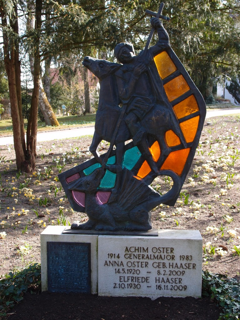 Grab des Generalmajors der Bundeswehr Achim Oster (1914-1983) auf dem Waldfriedhof in Dachau.